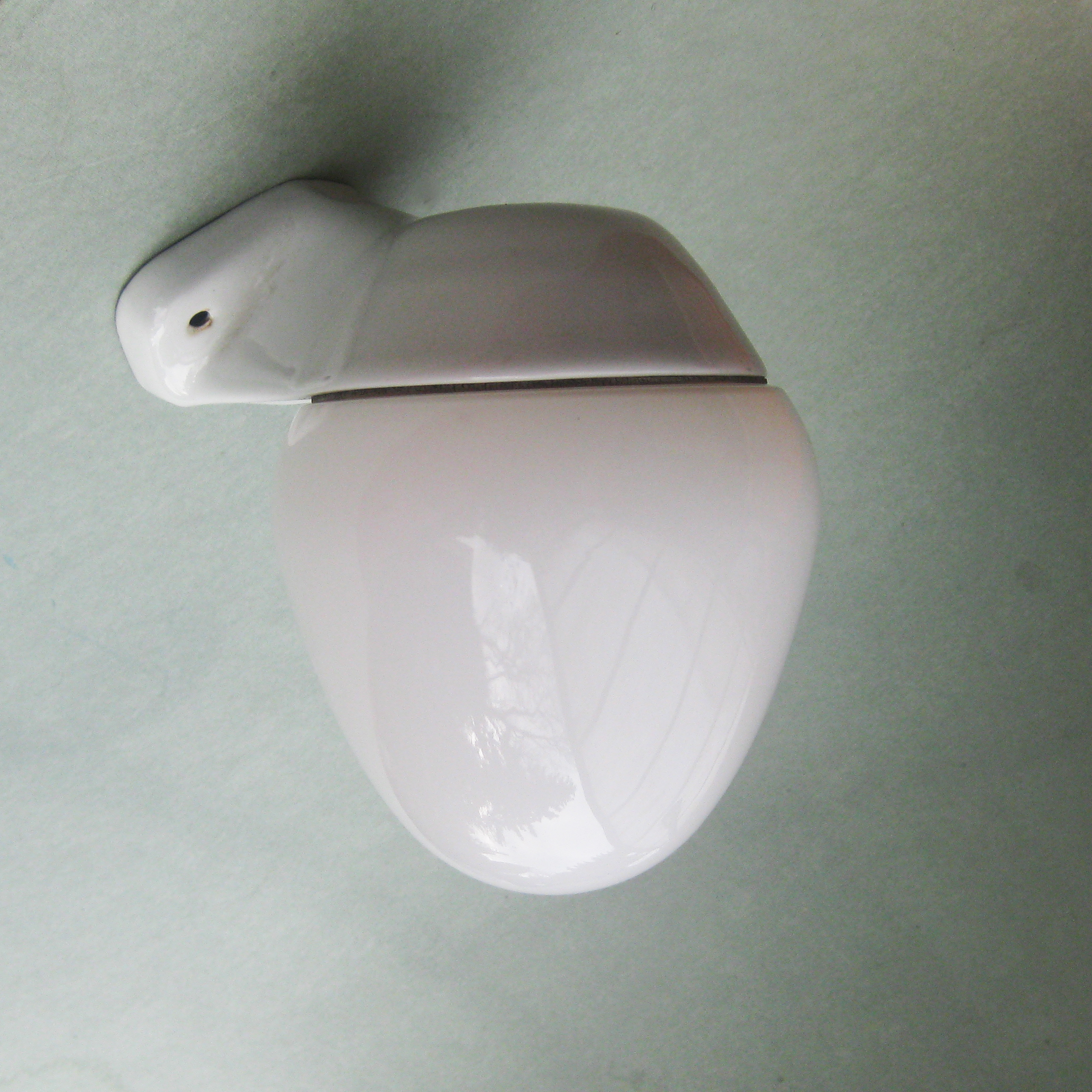 Leuchte WV 343 von Lindner Leuchten, entworfen von Wilhelm Wagenfeld, Abb. kopfstehend